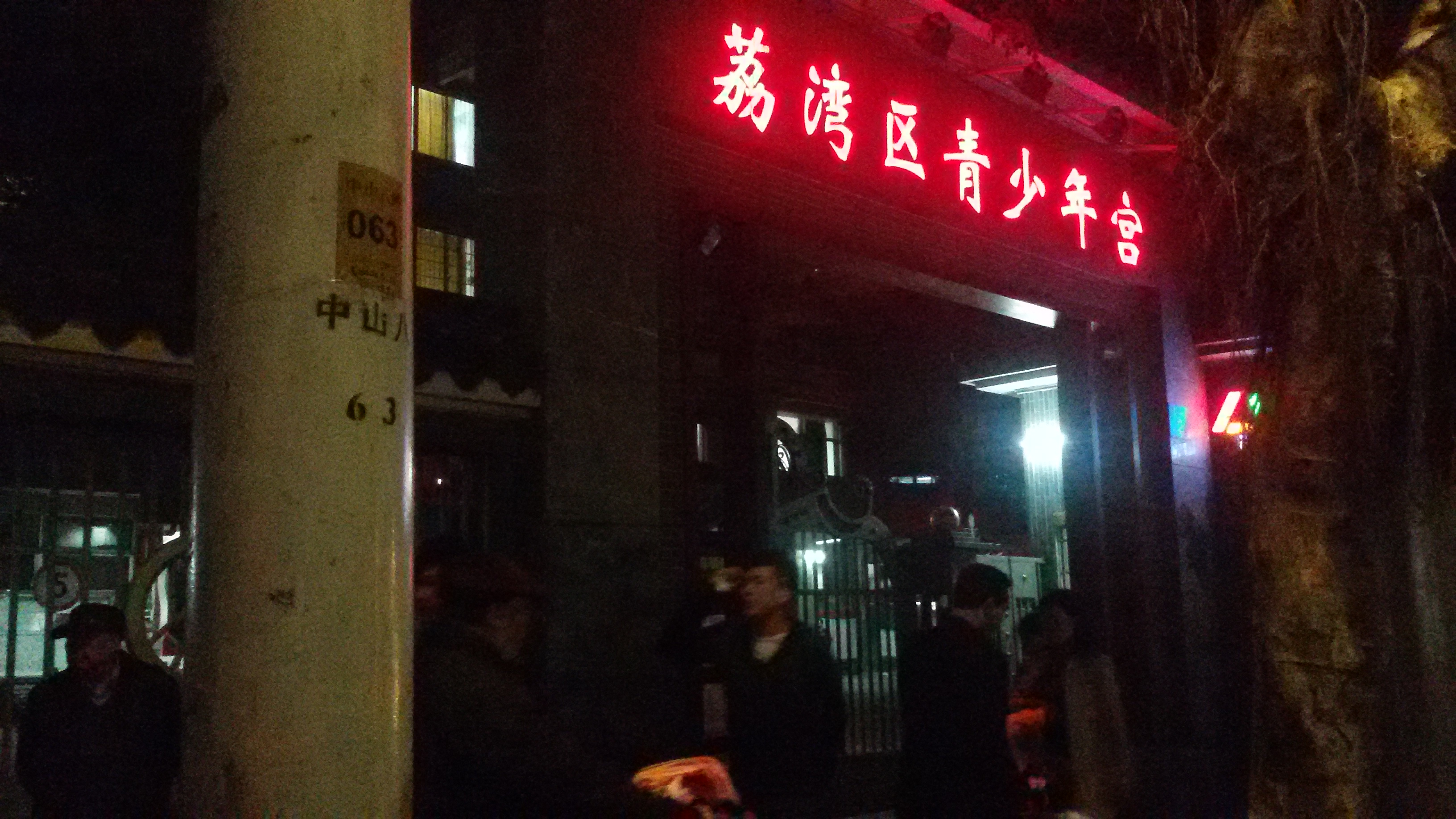 粵語: 荔灣區青少年宮